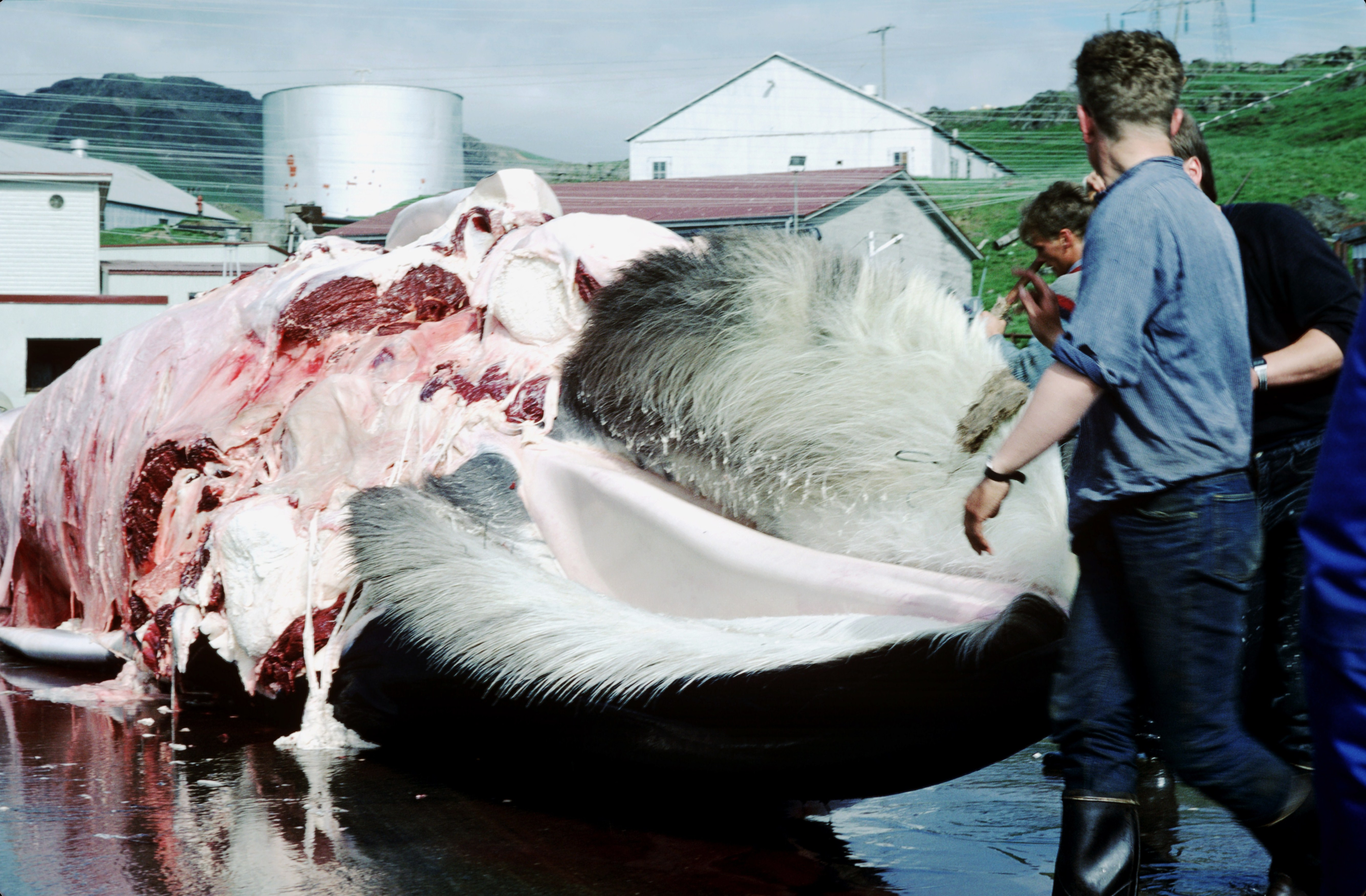 Dépeçage d’ une baleine (un rorqual commun) à la station baleinière du Hvalfjörður (Fjord des Baleines) en Islande. Cette station est située presqu' au fond du Hvalfjörður, entre Miðsandur et la presqu' île de þyrilsnes, à 75 kilomètres au nord de Reykjavik. Port baleinier du Hvalfjörður, Ouest Islande/Région de la Capitale, Islande.